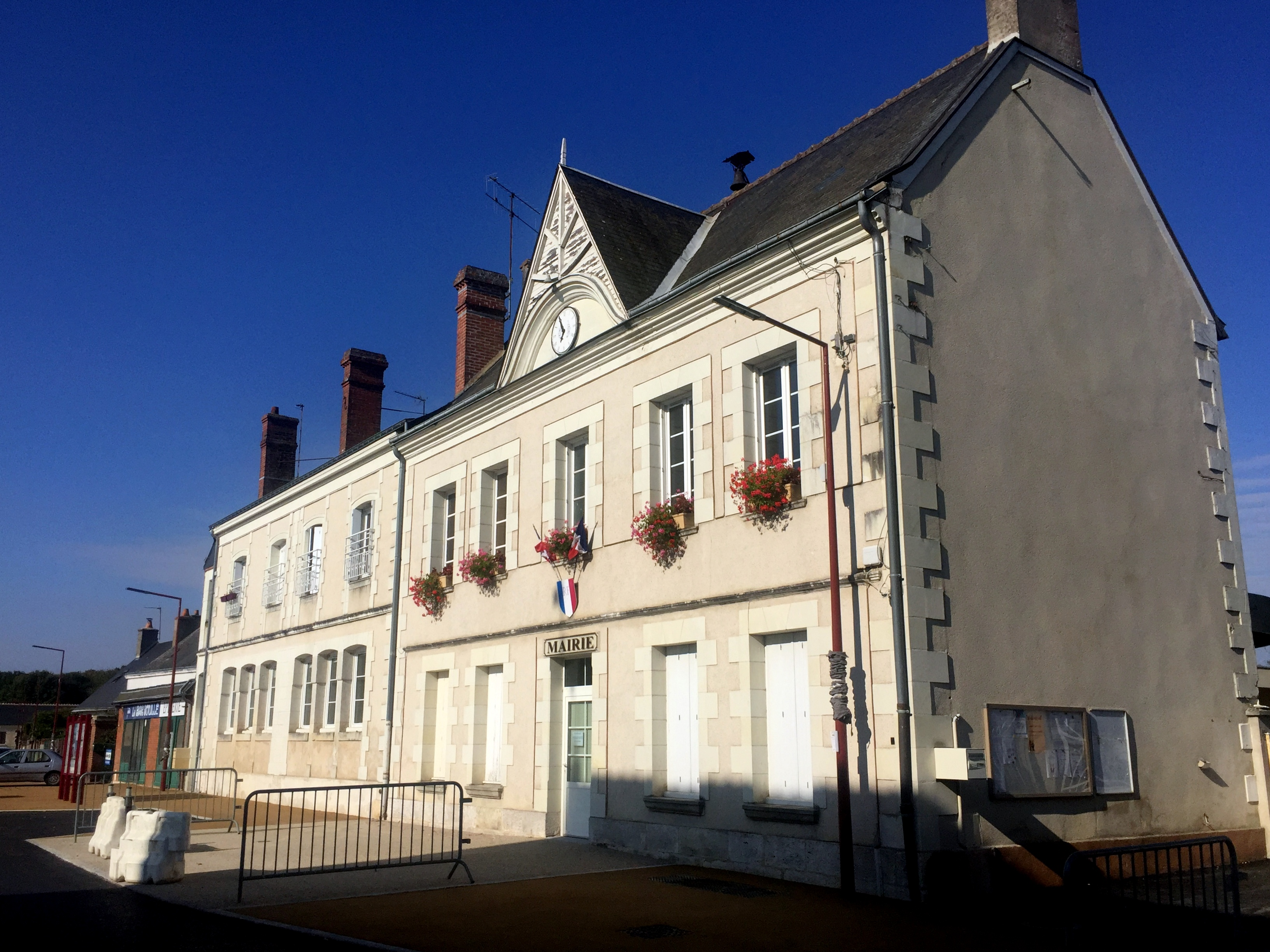 Opération libre à Montreuil-en-Touraine, octobre 2016.